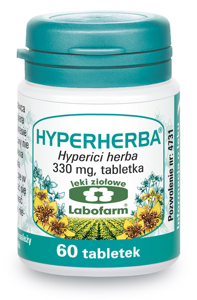 Lek z ziela dziurawca pomocniczy w stanach depresyjnych i poprawiający nastrój